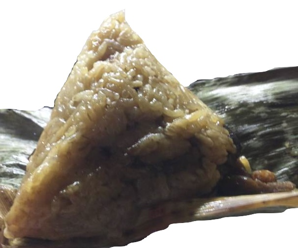 中文（台灣）: 台灣北部粽